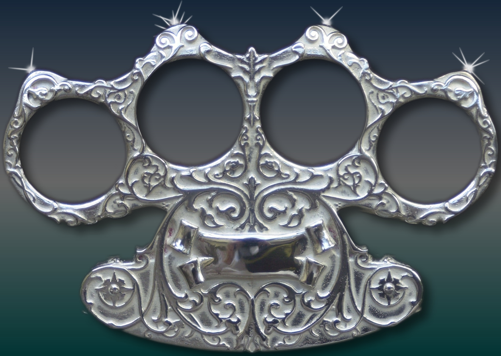 De trofee van De Diamanten Kogel